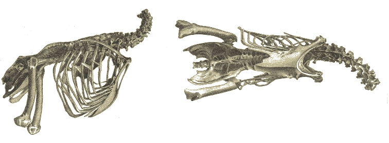 Nordinseltakahe (Porphyrio hochstetteri)